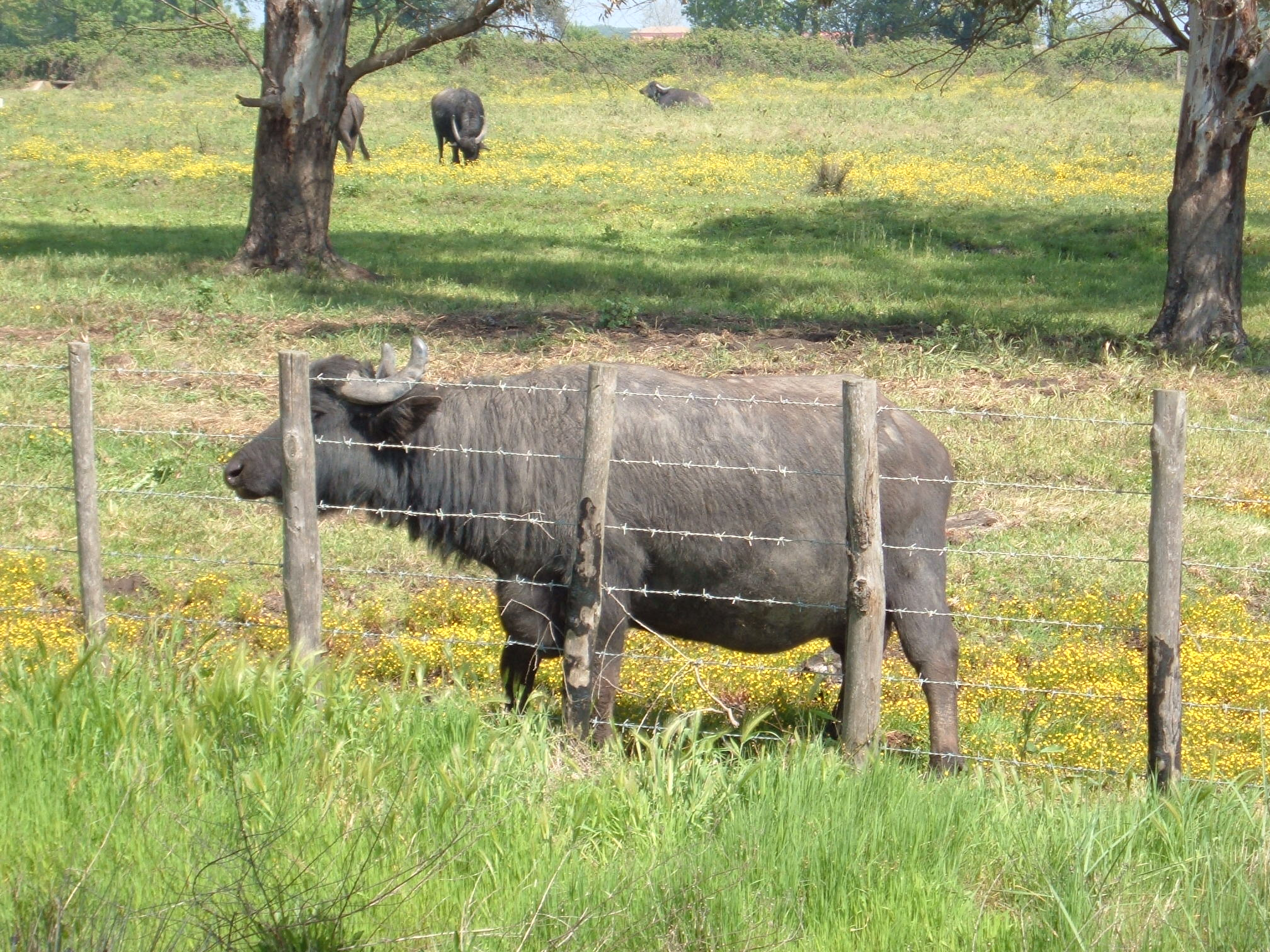 Buffalo, Agro Pontino, Italy.